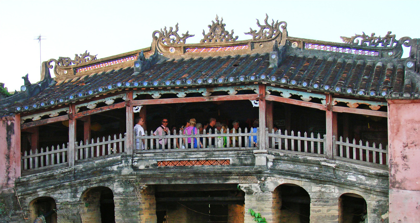 Chùa Cầu.